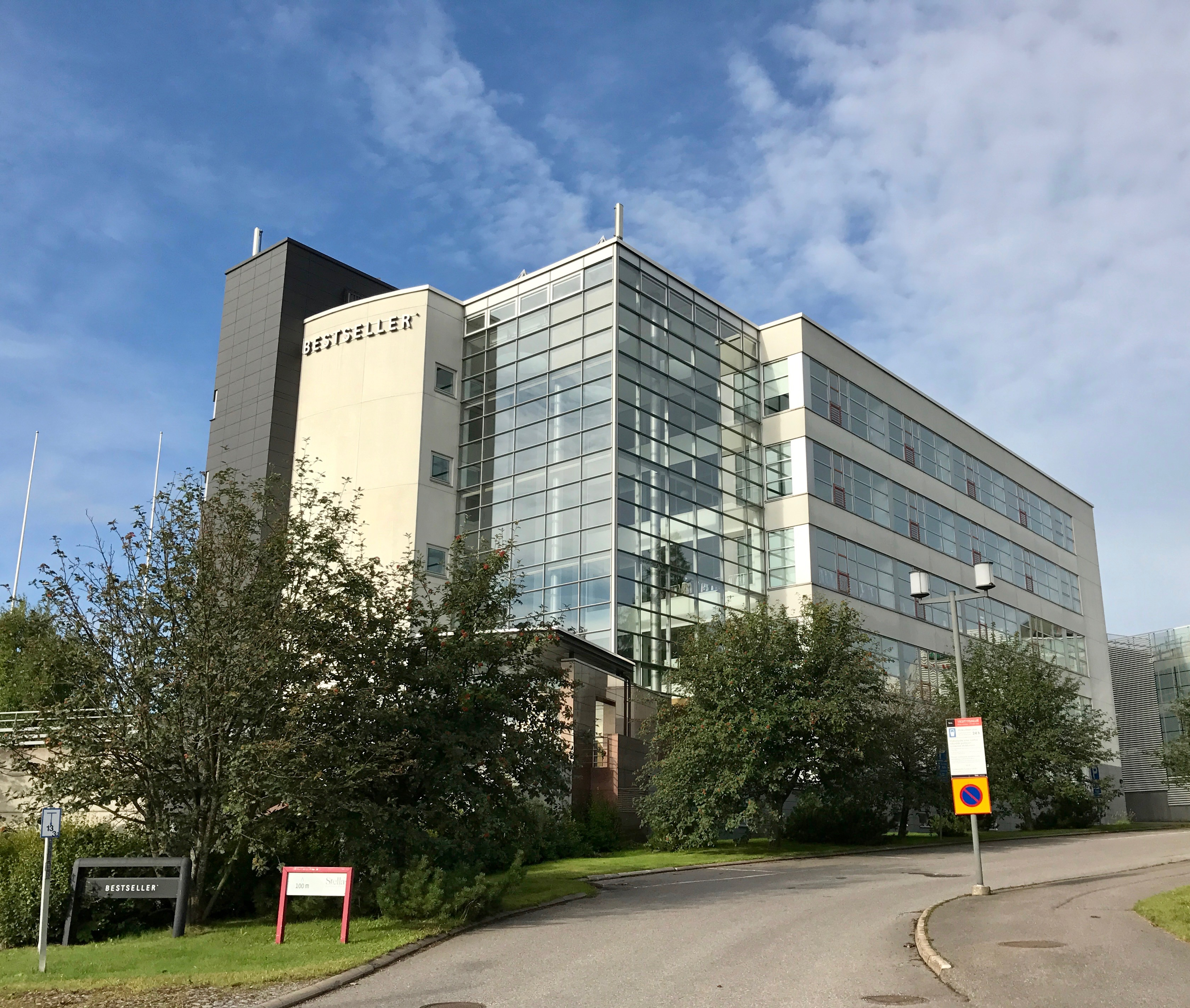 Bestseller Wholesale Finland Oy:n päätoimipiste Espoon Leppävaarassa, osoitteessa Lars Sonckin Kaari 6.